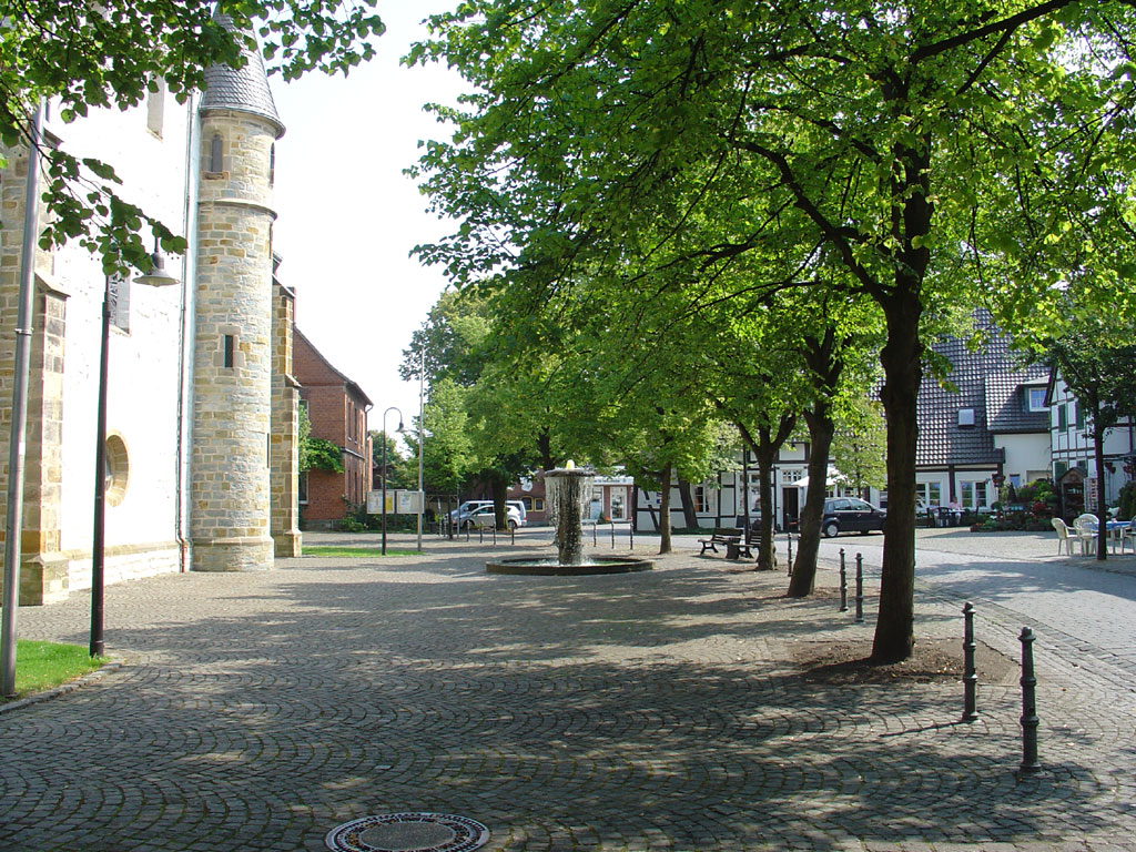 Kirchplatz in Langenberg, links Kirche St. Lambertus und St. Laurentius, rechts Cafe zur Linde